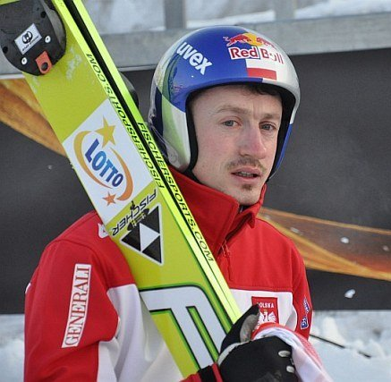 Adam Małysz podczas serii treningowej przed konkursem mężczyzn na skoczni dużej w ramach Mistrzostw Świata w Narciarstwie Klasycznym 2011 w Oslo.